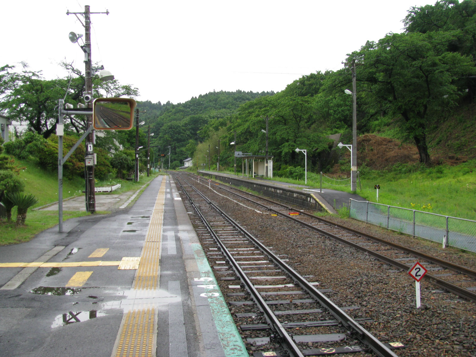 磐越東線舞木駅